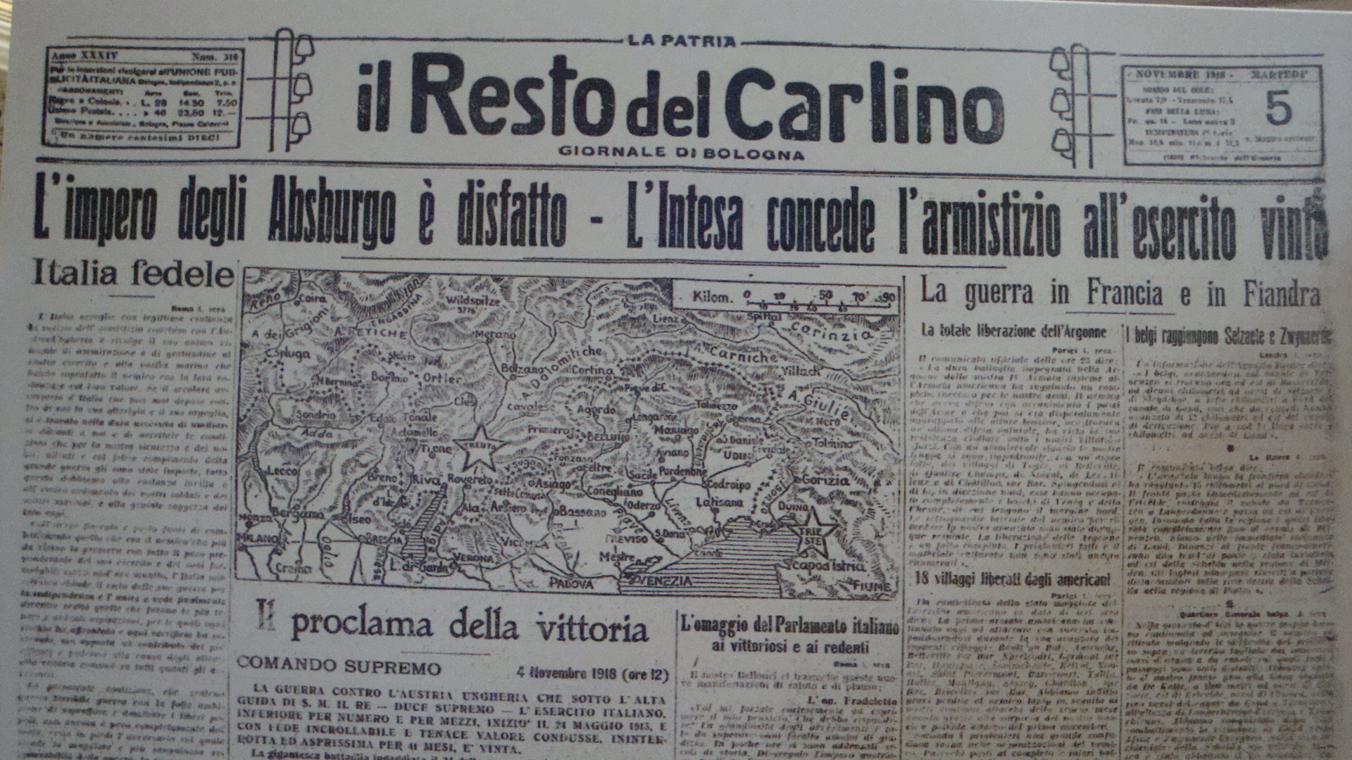 Prima pagina de il Resto del Carlino del 5 novembre 1918 (Anno XXXIV).